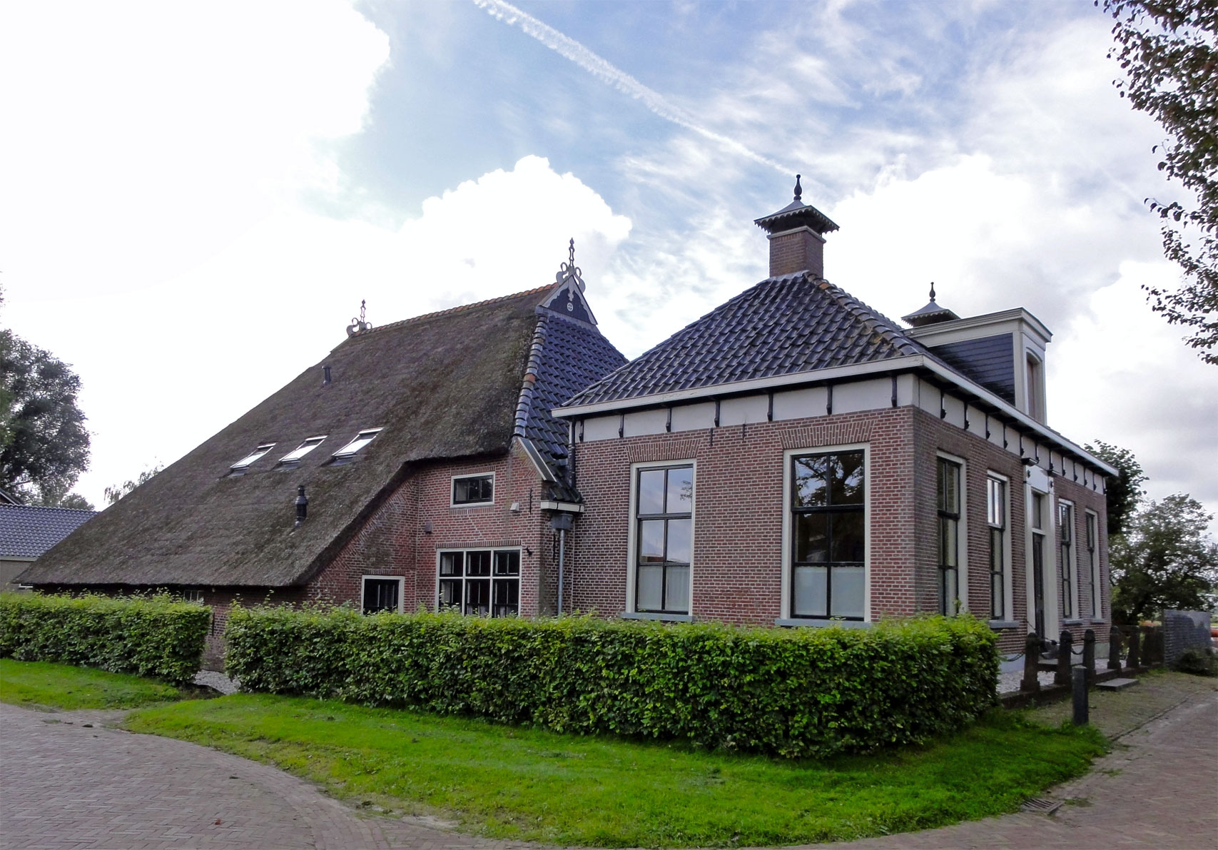 Elte Martens Beimastrjitte 2 Eastermar